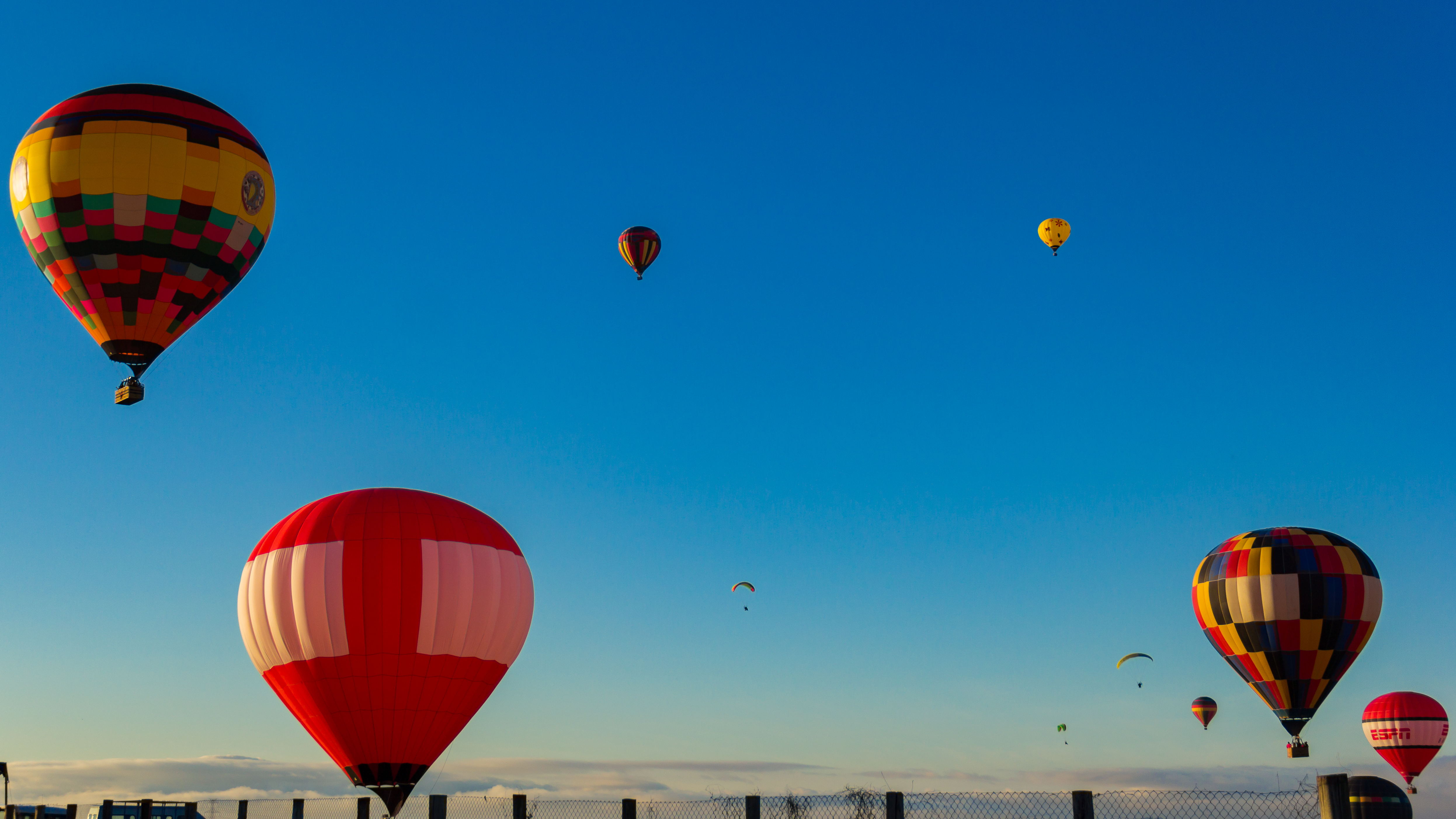 Balão em boituva